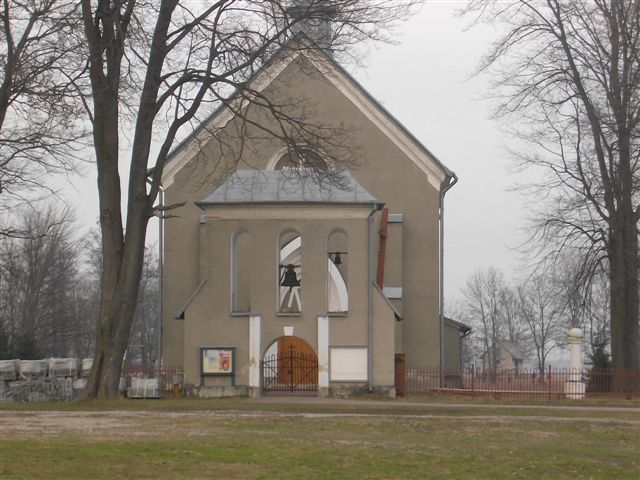 Zamch - dawna cerkiew grekokatolicka ob. rzymskokatolicki kościół parafialny. p.w. św. Jozafata i św. Praksedy, 1842